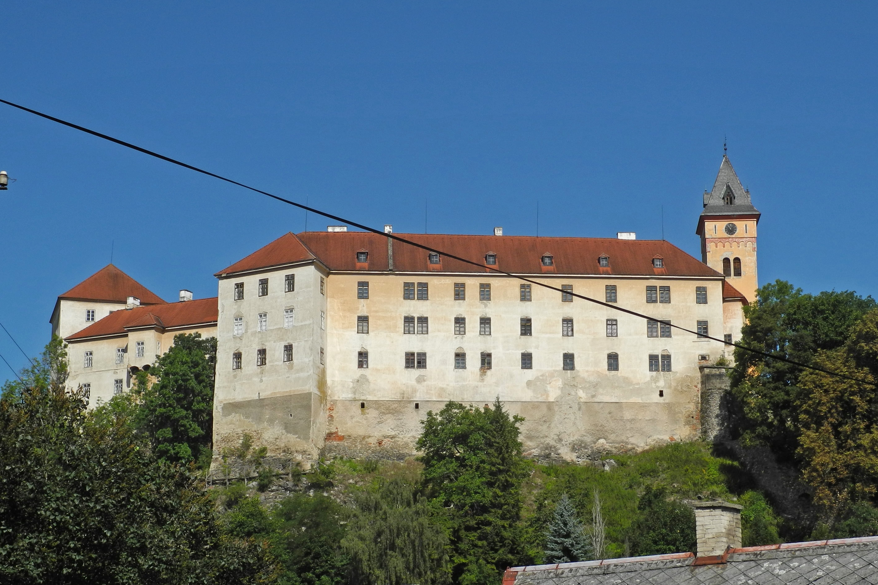 Schloss Vimperk in Winterberg (Vimperk) im Böhmerwald